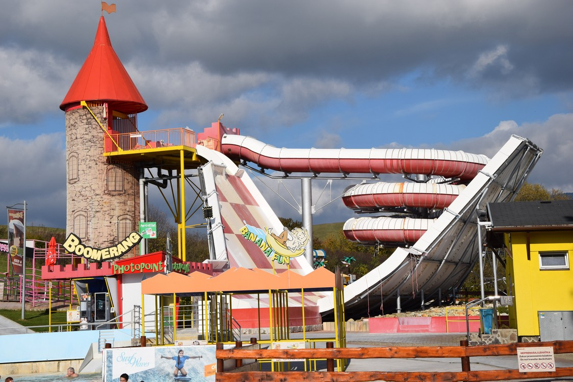 Areál TL vonku